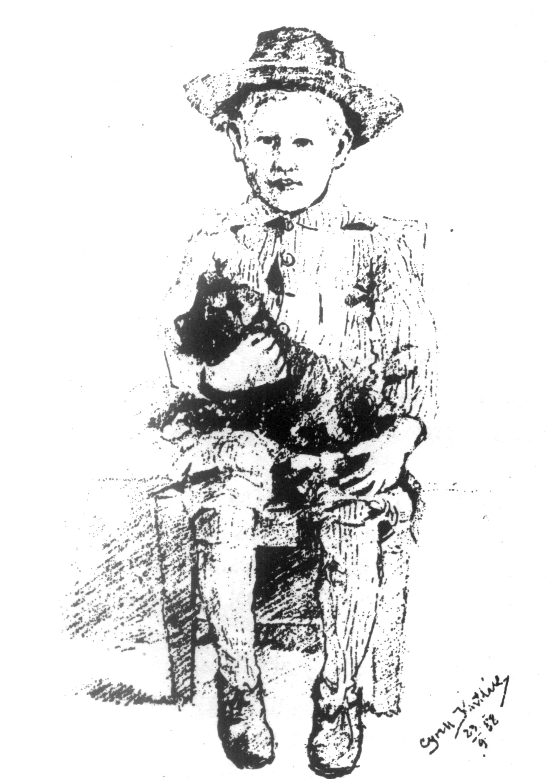 Cyril Kutlik: Felix Kutlik ml., 23.9.1888 v Kulpíne (kresba ceruzou)